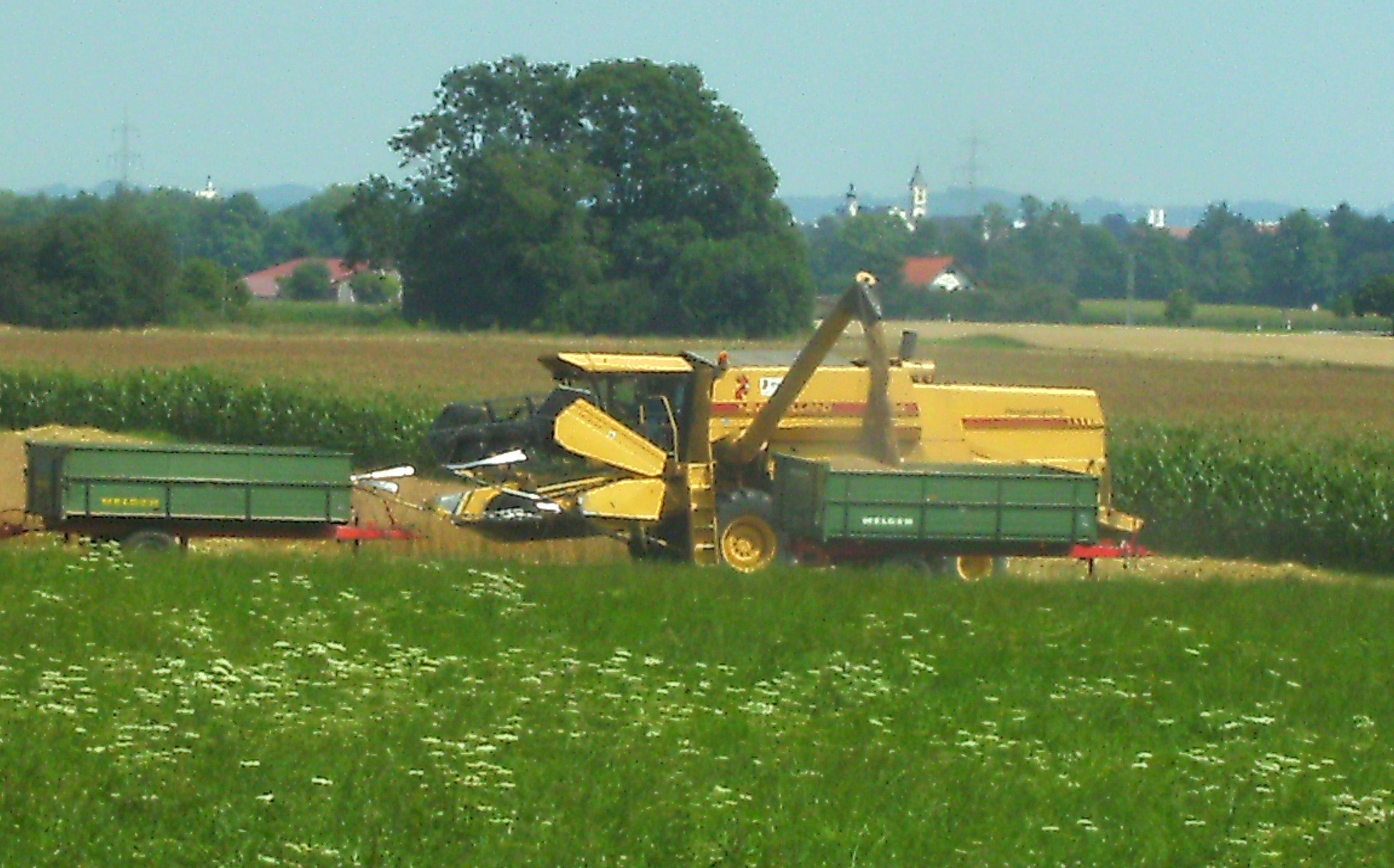 Getreideernte